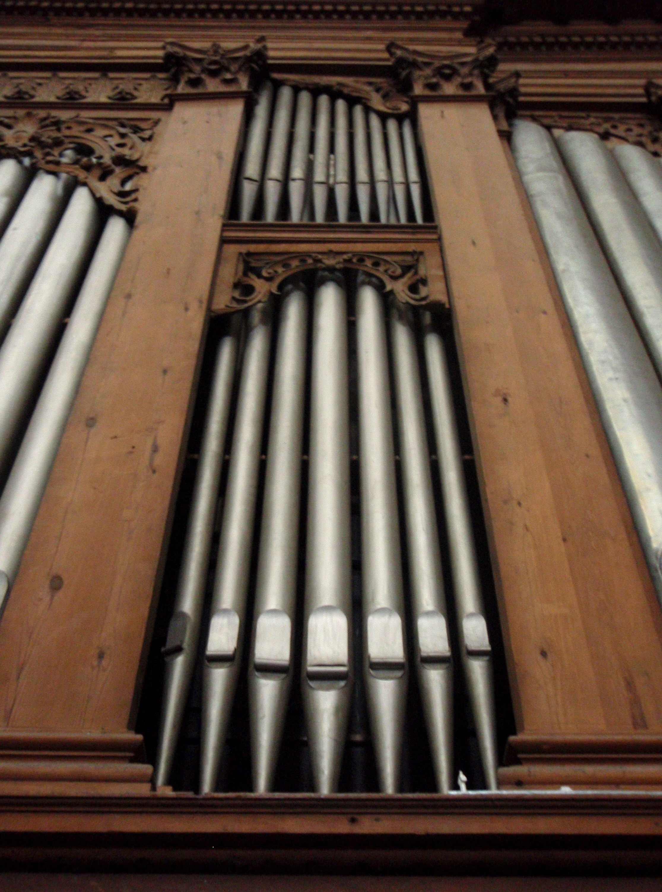 Catedral de Valladolid (España) detalle del órgano. Caja de pino de 1792 y tubos de fachada, pertenecientes al registro Montre 8', realizados por A. Amezua en 1904.